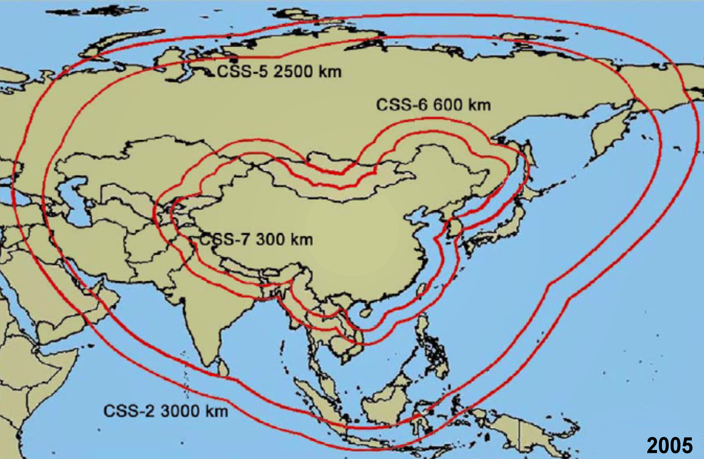 Reichweite der chinesischen Mittelstreckenraketen 2005 Range of intermediate-range missile